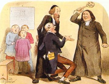 Este autor ha muerto hace más de 80 años. Fuente de la imagen: Lithographie de Ch. Vernier